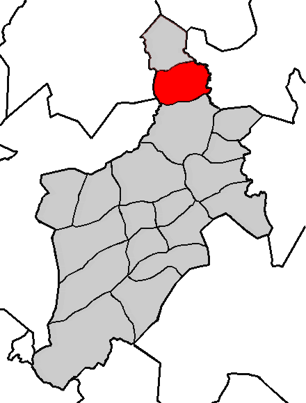 Situación da parroquia de Crendes no concello de Abegondo